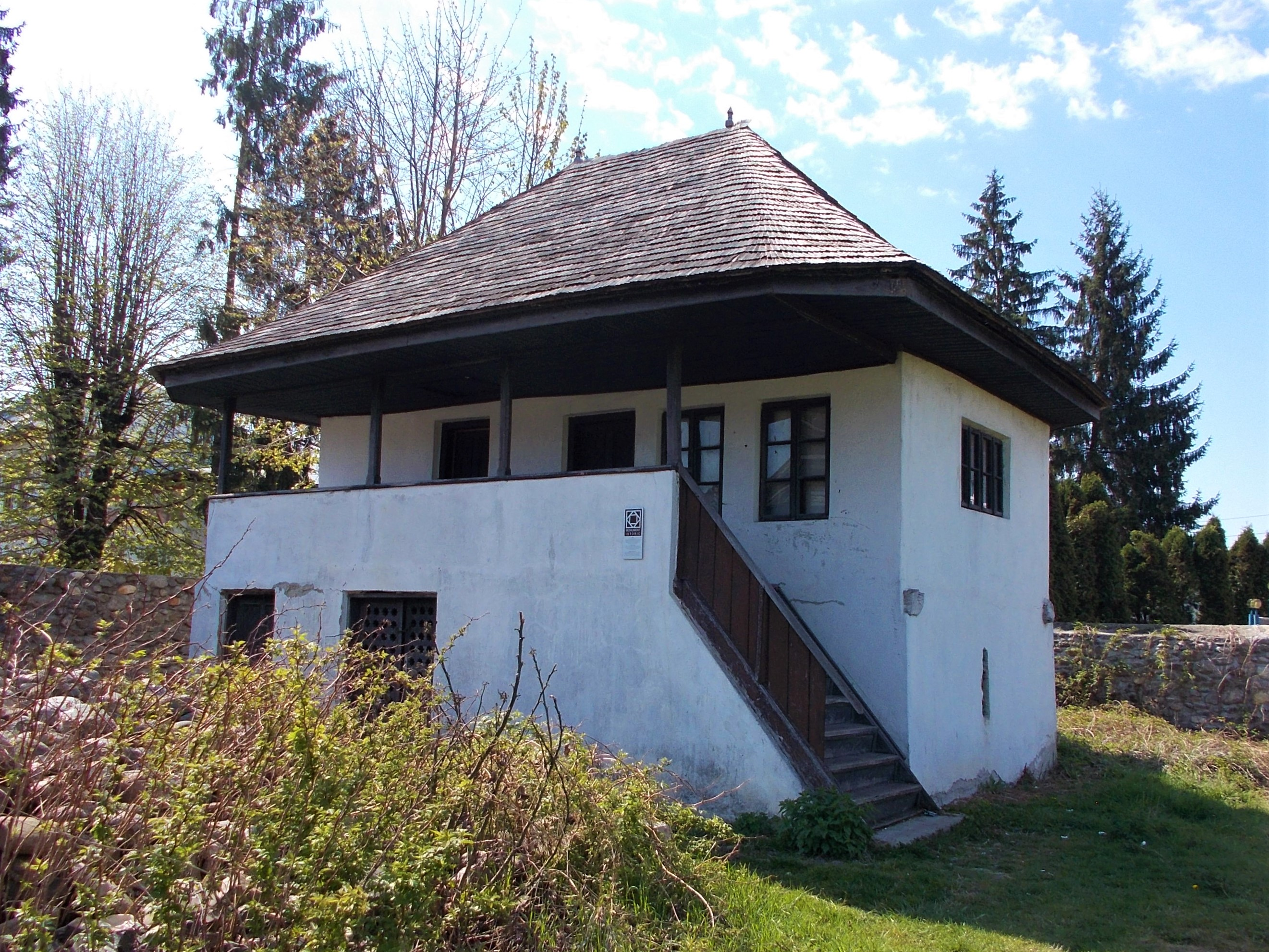 Casă tradițională argeșană (1867) aflată în Curtea Domnească din Curtea de Argeș 09